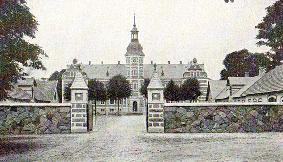 Østrupgård er en gammel hovedgård, som nævnes første gang i 1456. Østrupgård ligger i Østrup Sogn, Nordfyns Kommune. Hovedbygningen kaldt Østruplund fra 1928 er opført i 1881-1882 ved C. Lendorf.